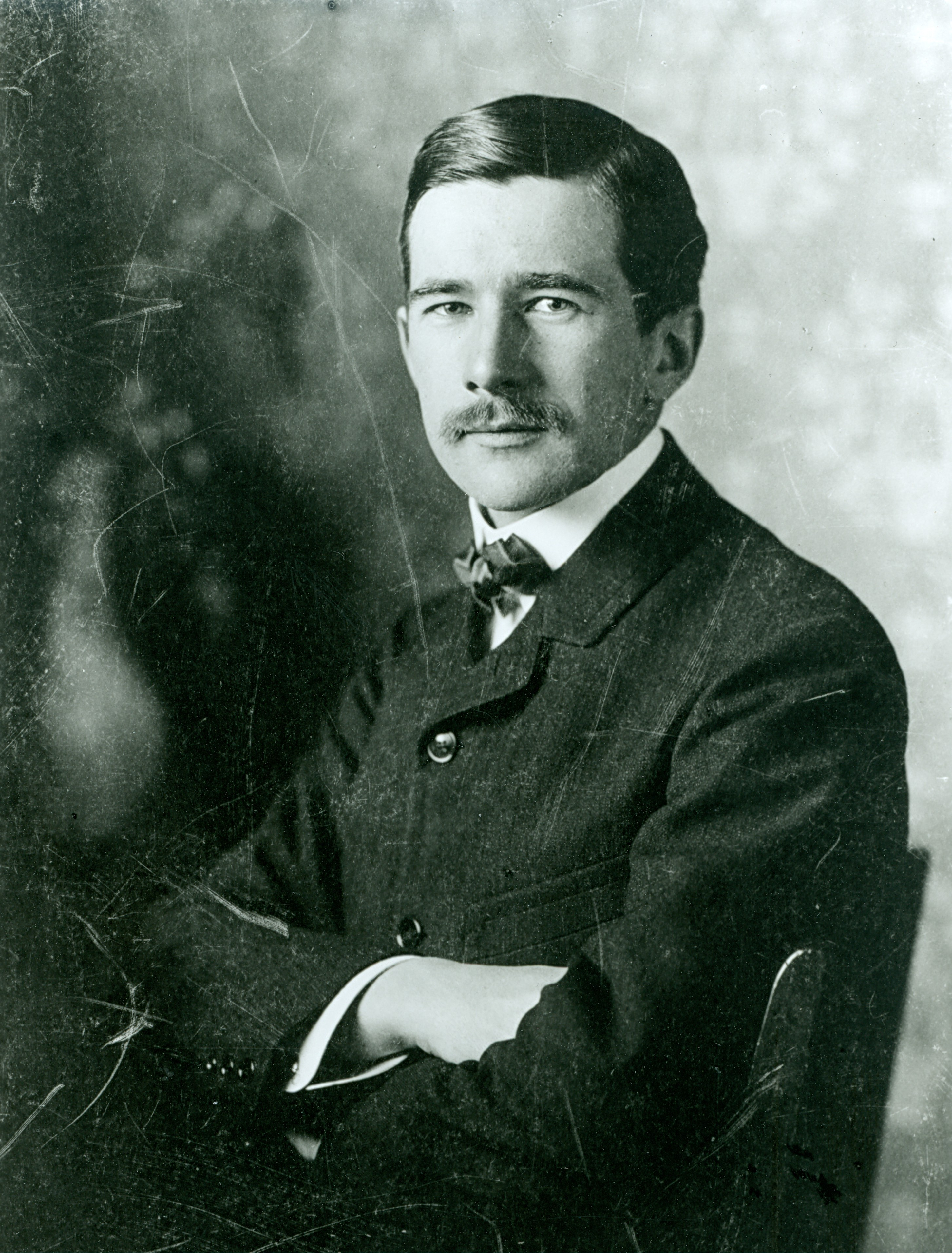 Porträtfoto Herbert Eugen Esche